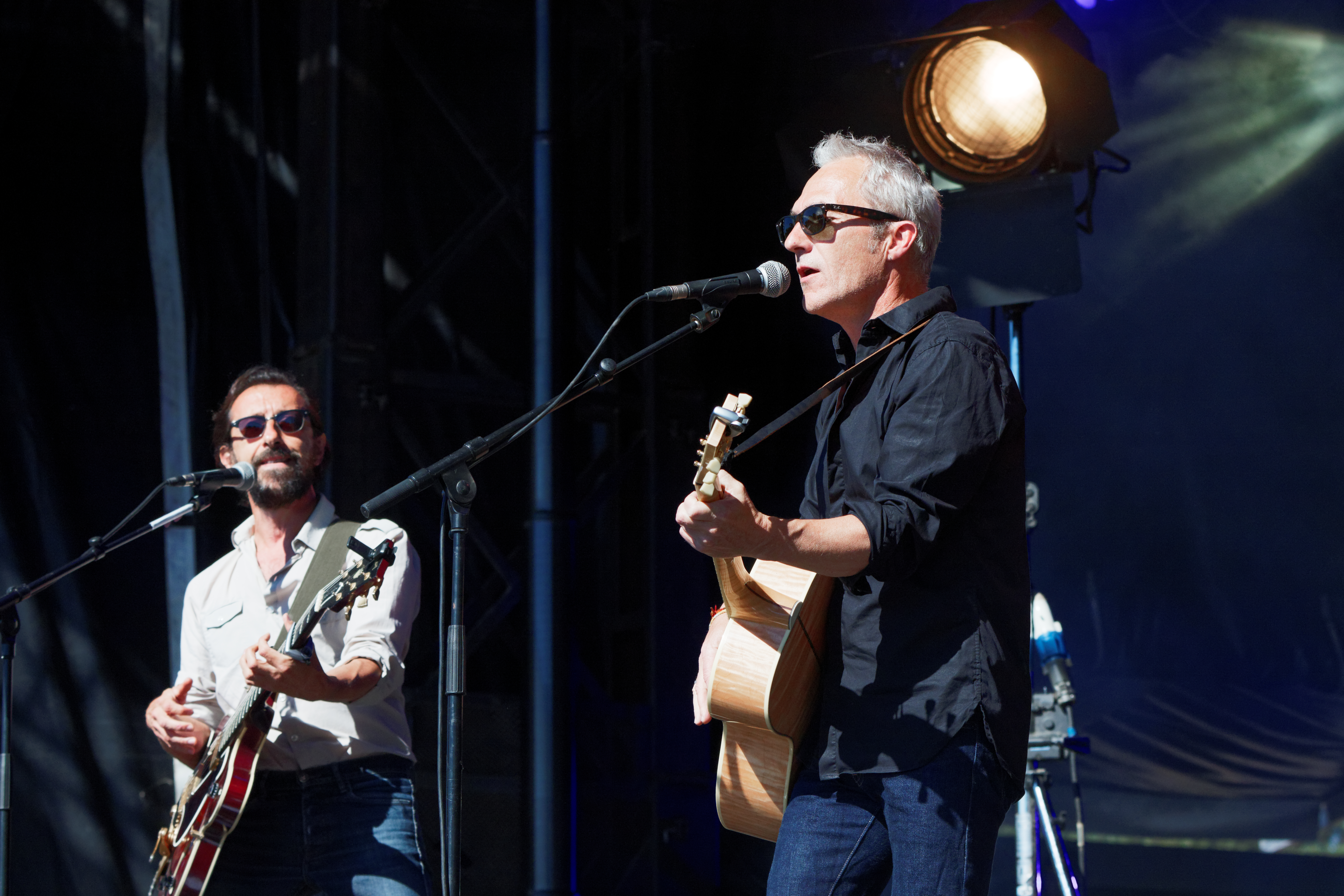 Les Innocents en concert sur la scène Landaoudec lors du festival du Bout du Monde 2016 à Crozon dans le Finistère (France).